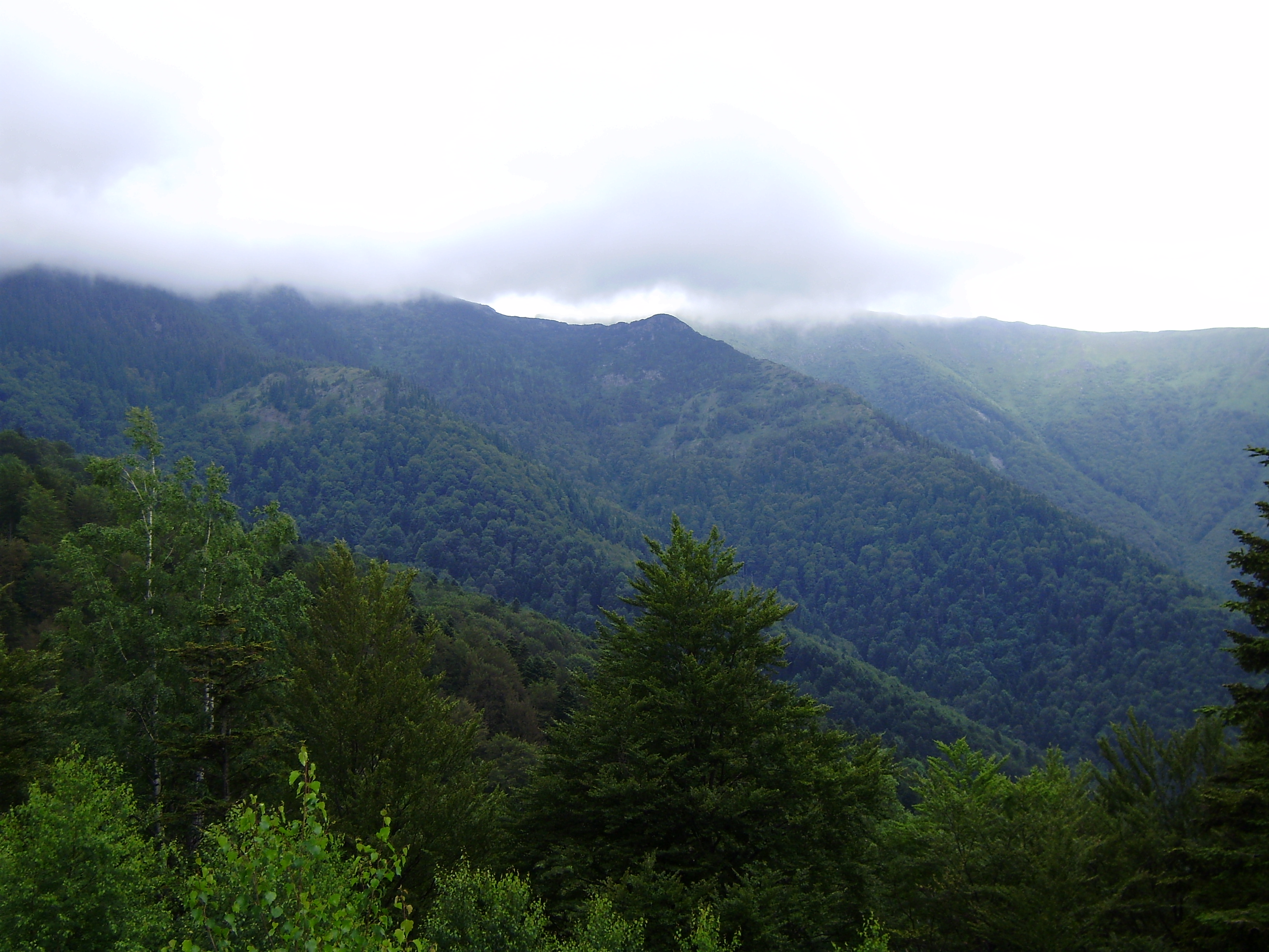 Изглед към резерват „Горната кория“ от пътя за хижа „Ком”.